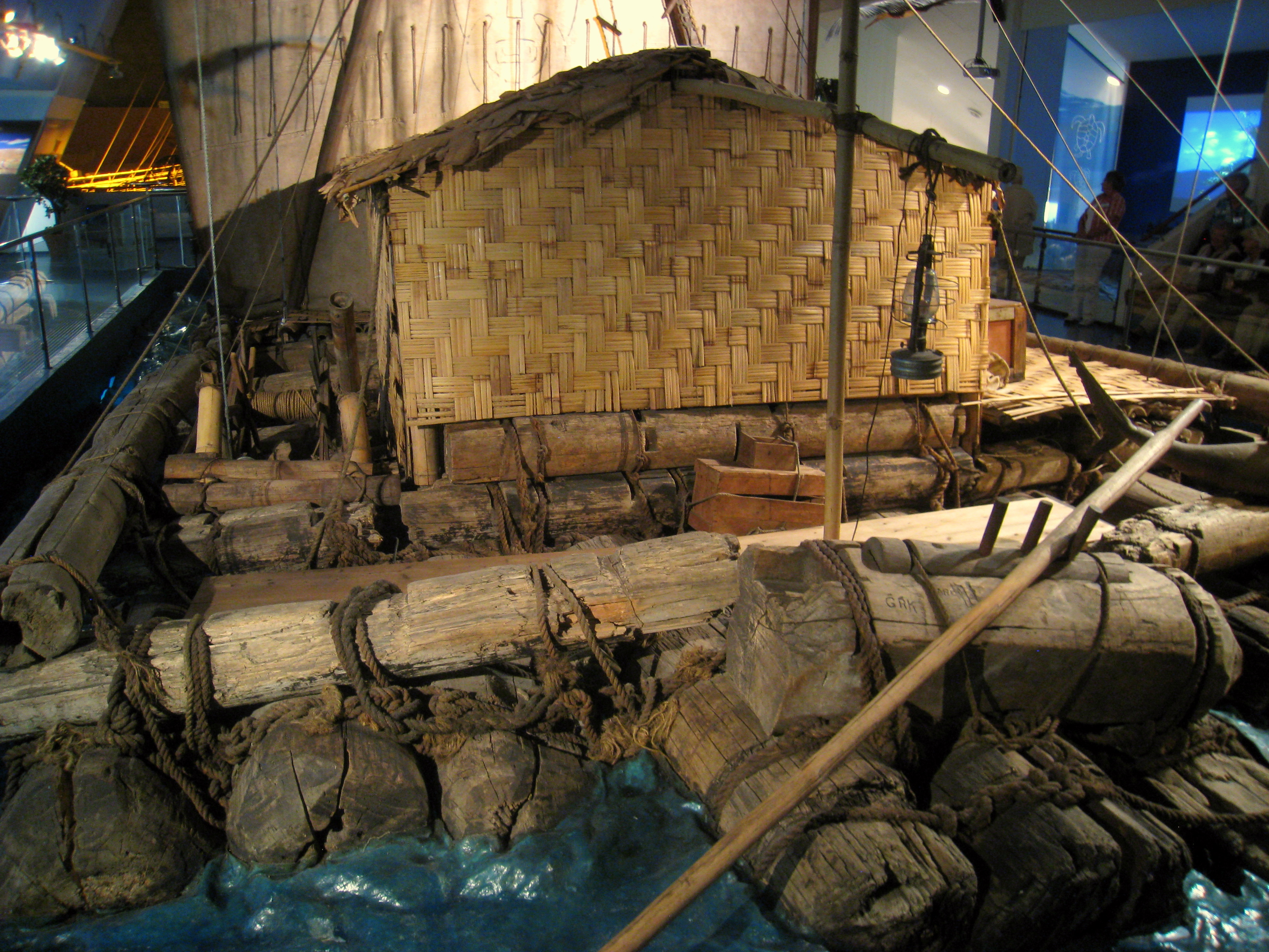 Kon-Tiki raft, in Kon-Tiki Museum, Oslo, Norway.